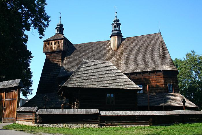 Drewniany kościół w Haczowie. Jeden z najcenniejszych drewnianych kościołów w Polsce. Wpisany na liste UNESCO